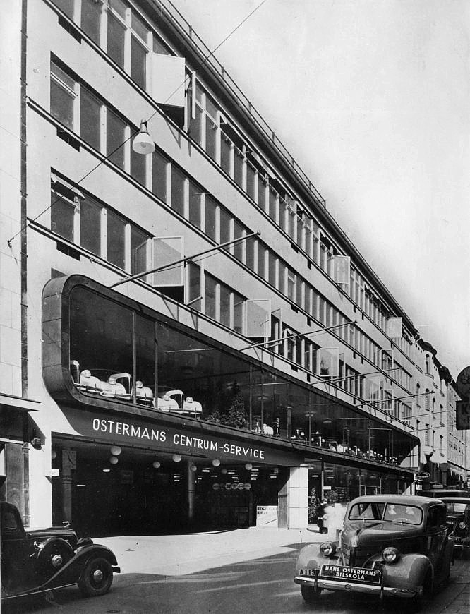 Infart till bilsalongerna, Ostermans Centrumservice på Grev Turegatan. Byggnadsår 1939. Arkitekter Mauritz Dahlberg och Harry Egler